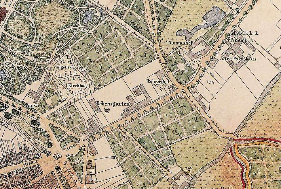 Der Robenshof in Aachen auf einem Stadtplan von 1860